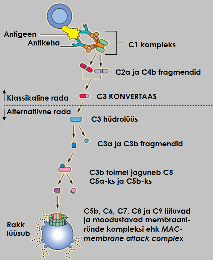 Komplemendi süsteem koosneb rohkem kui 30 valgust. Süsteemi aktivatsioon võib toimuda läbi 3 erineva raja: klassikaline, lektiini ja alternatiivne rada. Klassikalise raja korral on vajalik antigeen-antikeha kompleksi olemasolu. Alternatiivse ja lektiini raja aktiveerimiseks piisab vaid C3 spontaansest hüdrolüüsist või antigeeni olemasolust. Komplemendi raja tsütolüütiliseks lõpp-produktiks on membraaniründe kompleks, mis formuleerib patogeeni membraani transmembraanse kanali. Transmembraanne kanal põhjustab märklaudraku lüüsumise.